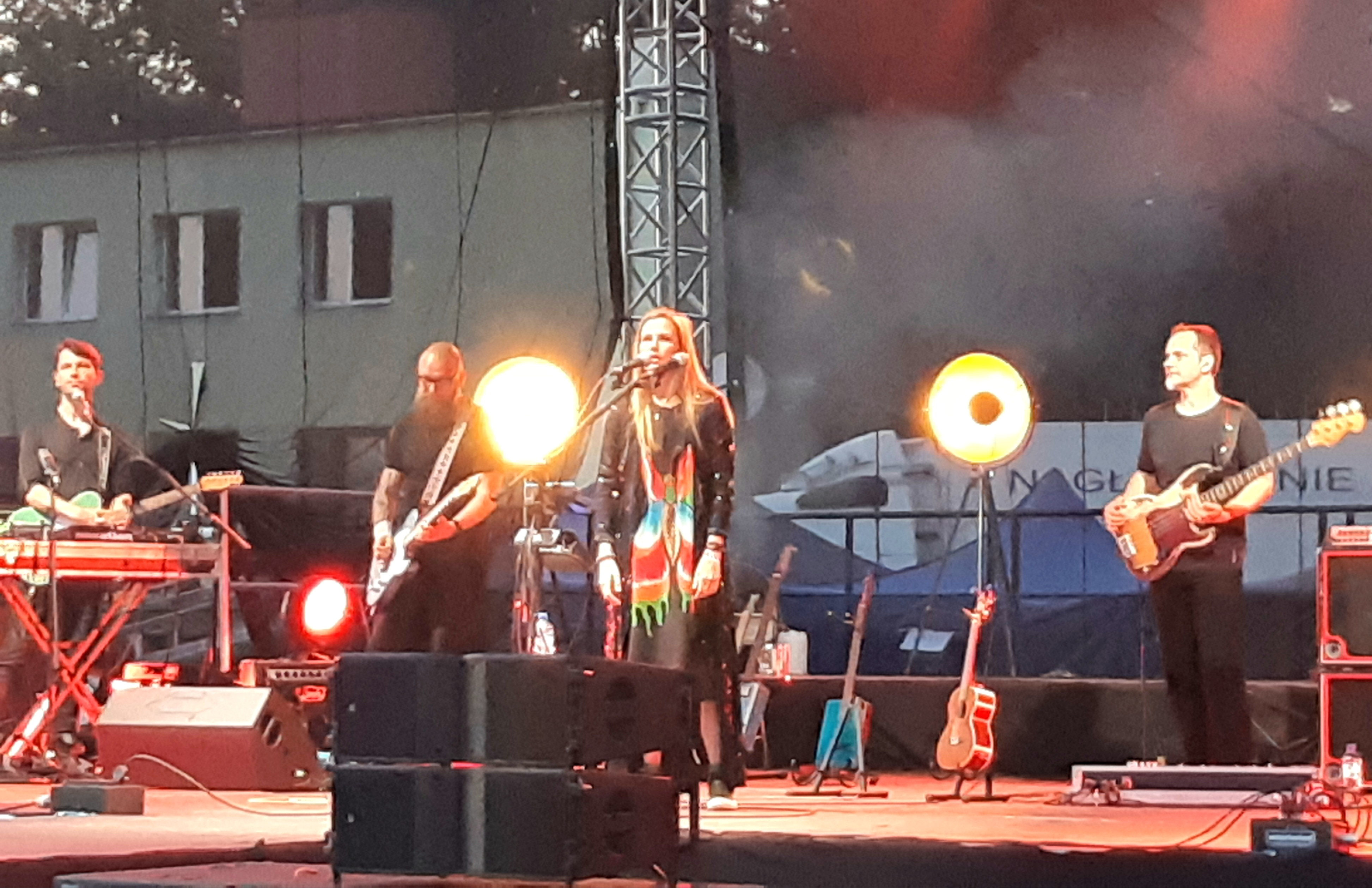 Zespół Micromusic na Dniach Śremu 2019